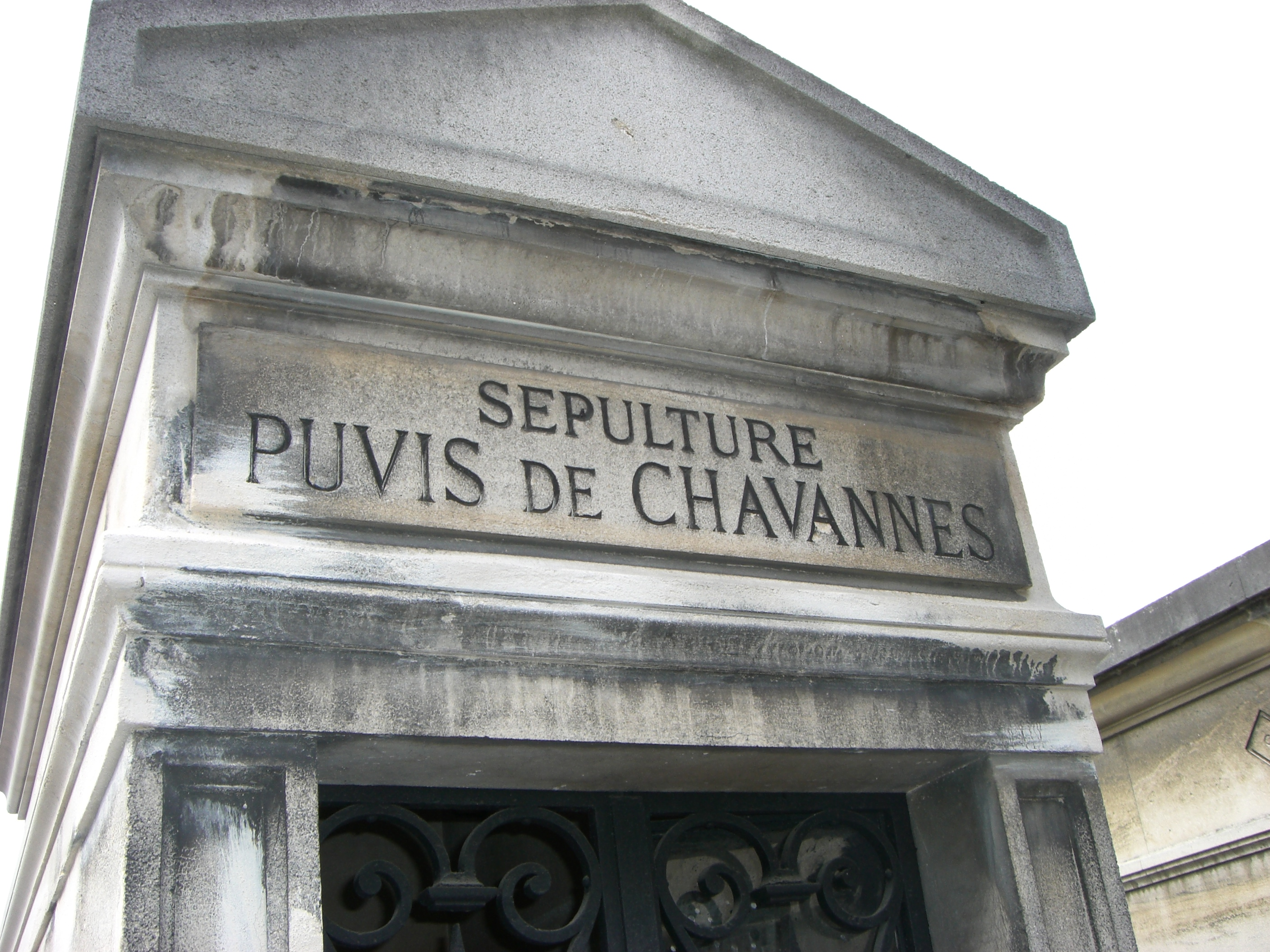 Chapelle funéraire de Pierre Puvis de Chavannes et de son épouse au cimetière ancien de 92200-Neuilly-sur-Seine